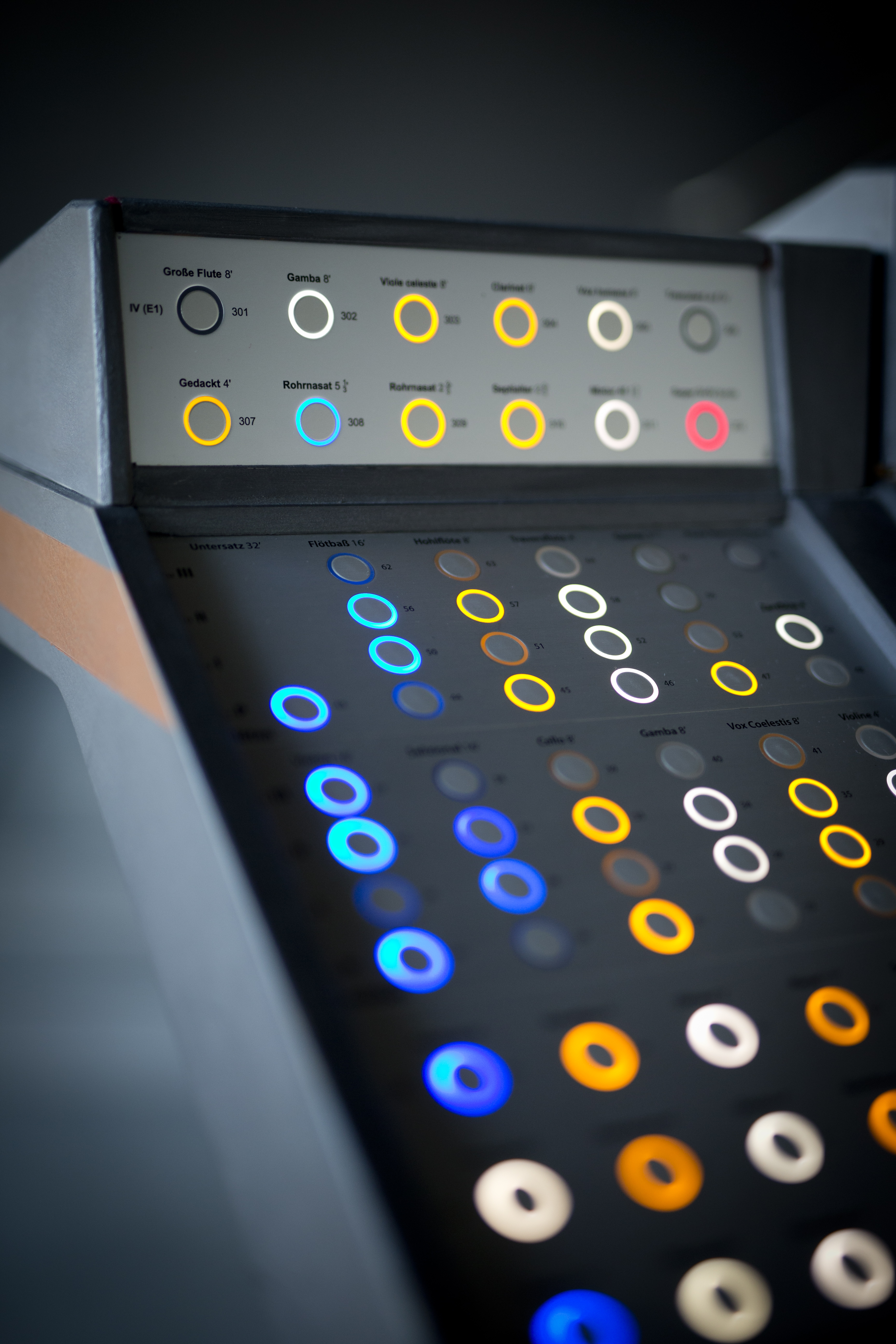 Harder-Völkmann-Orgel im Stockwerk Gröbenzell Orgeltisch Detail